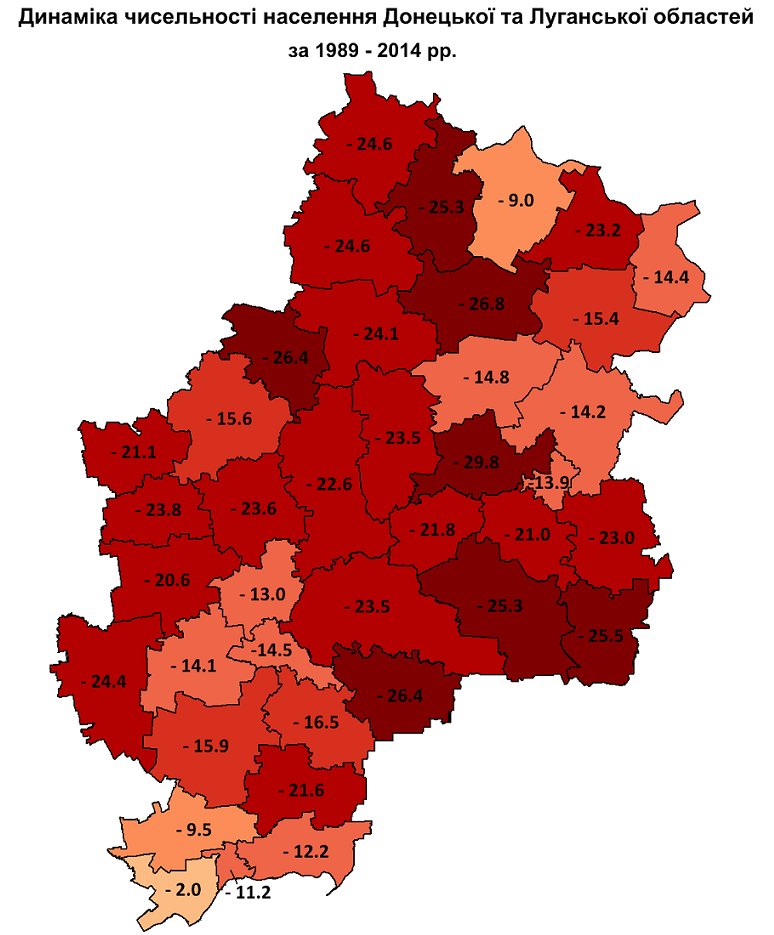 Динаміка чисельності населення Донецької та Луганської областей за 1989 - 2014 рр. (населення міст обласного підпорядкування включене до складу районів) / Population change of Donetsk and Luhansk oblasts, 1989 - 2014